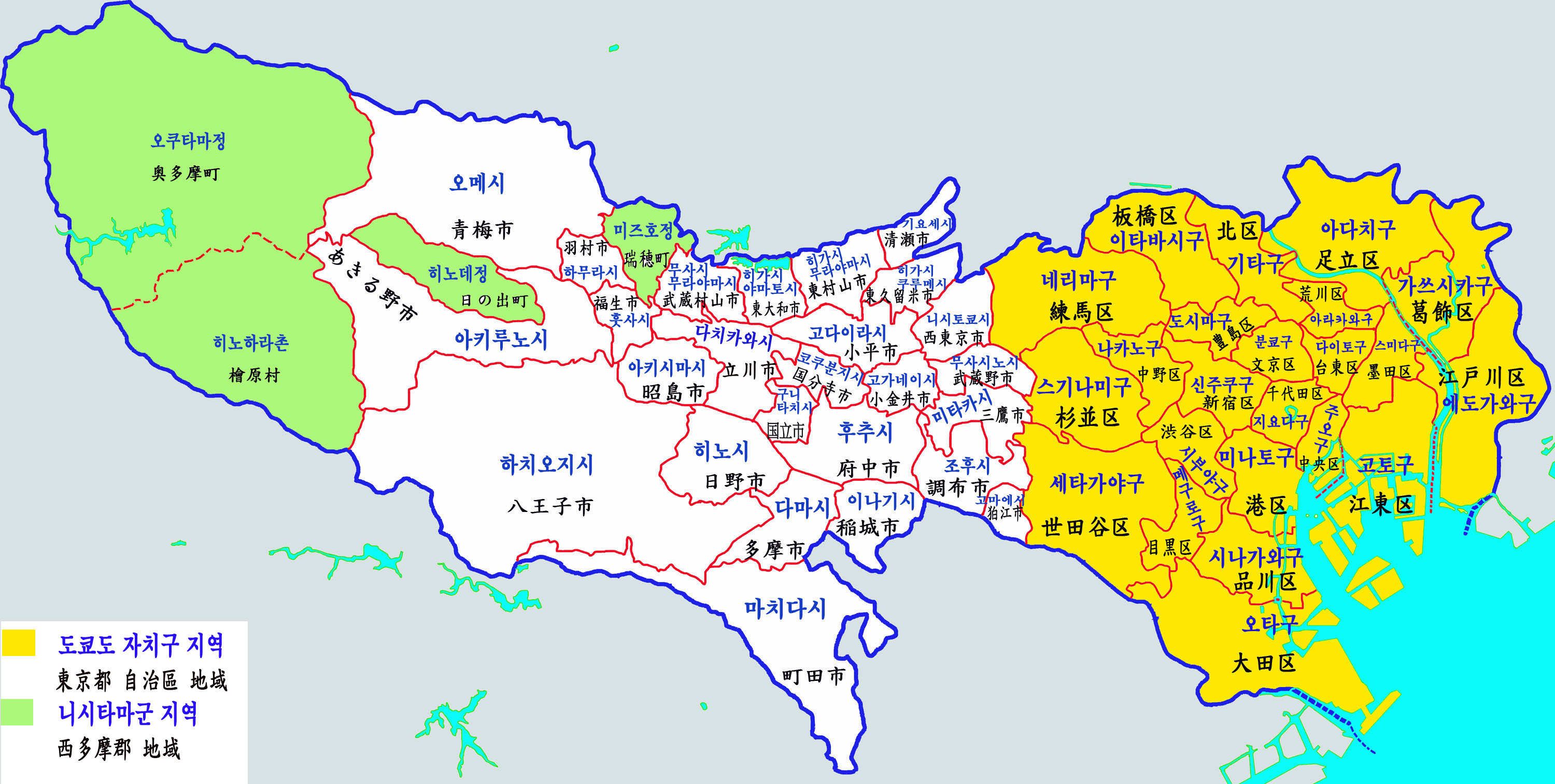 도쿄도 행정구역